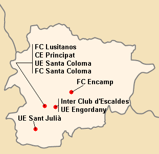 Répartition des clubs en Primera Divisio 2009-2010.